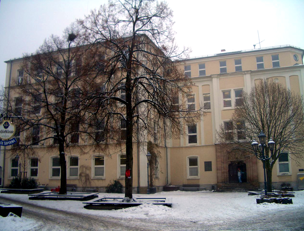 Fach-und Berufsoberschule Hof